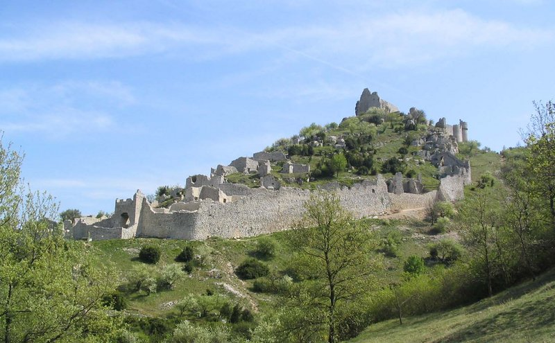 Chateau de Crussol, situé sur la commune de Saint Péray Photo personnelle prise en avril 2003